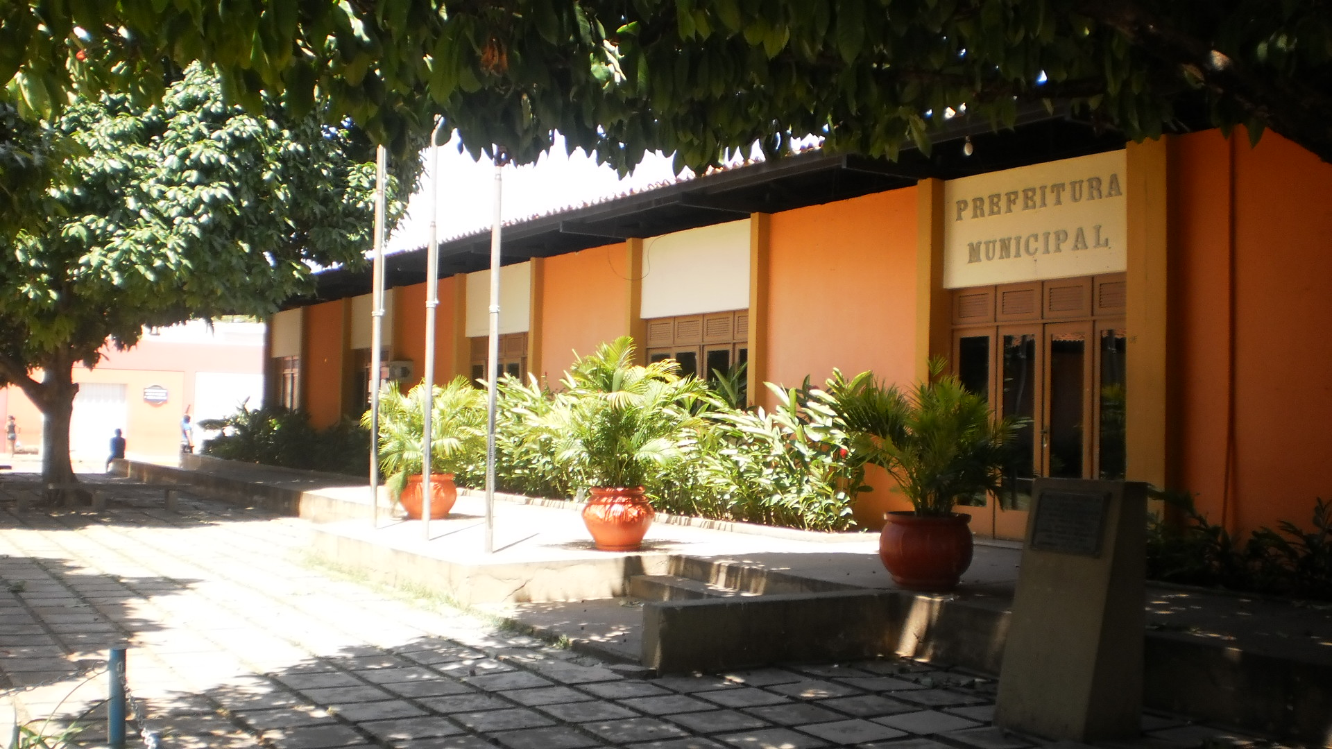 Paço Municipal - Prefeitura de Barbalha - Ce